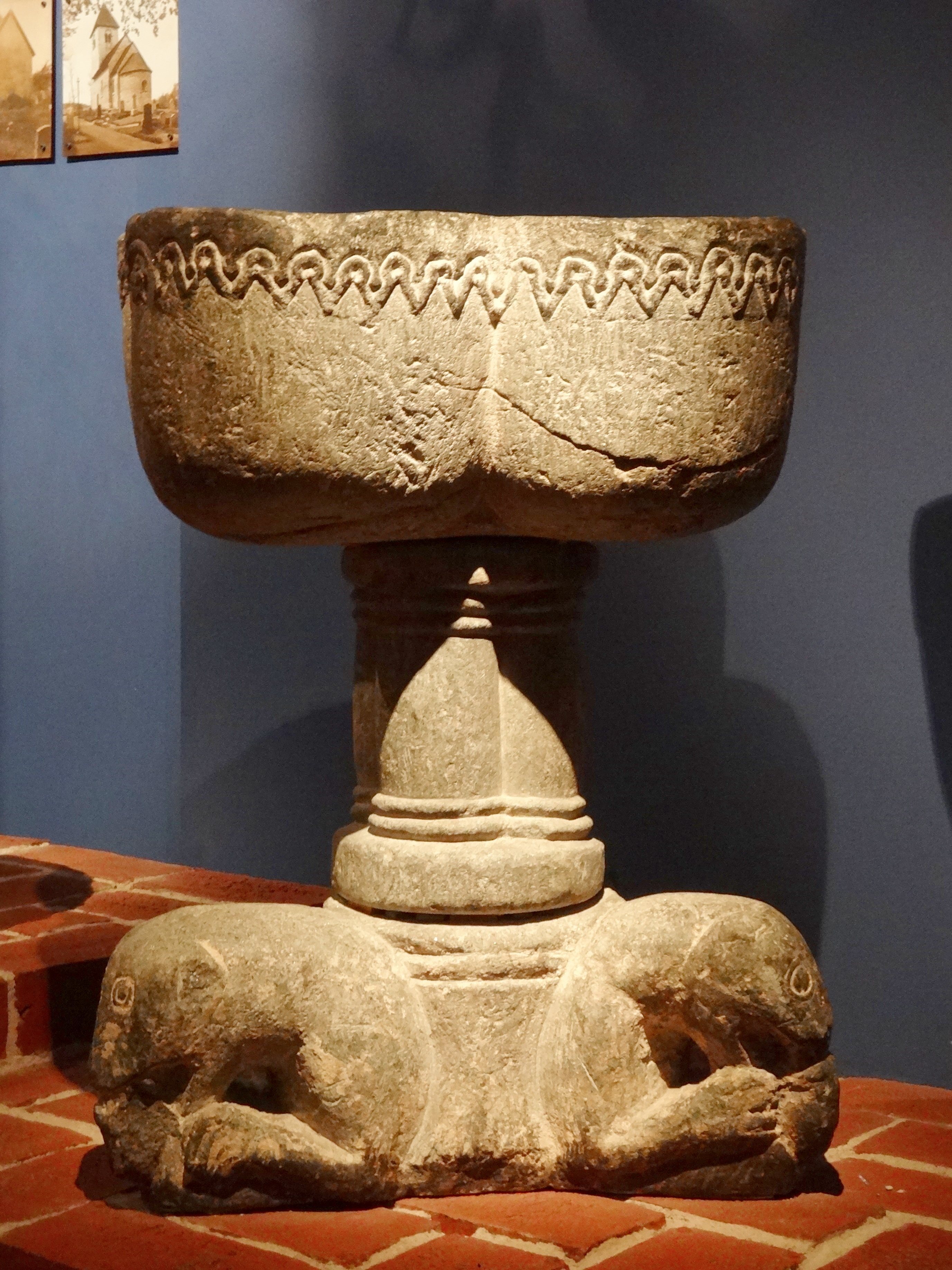 Dopfunt i täljsten, tillverkad under 1200-talets senare del. Ursprungligen från Askums kyrka i Bohuslän; förvärvat av Göteborgs Stadsmuseum 1875. Se även: GM:137.